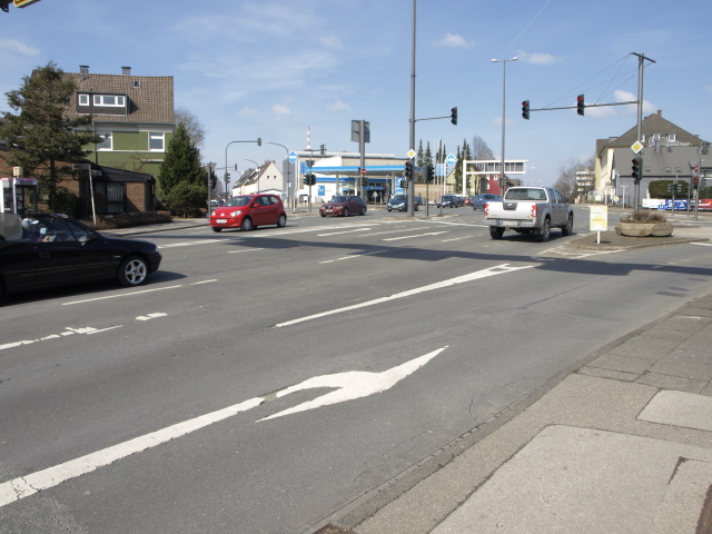 Kreuzung Hahnerberg, Blick von der Hahnerberger Straße Richtung Cronenberger Straße, links die Küllenhaner rechts Jägerhofstraße